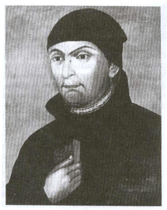 Presbítero y jurisconsulto Isidro Menéndez (1795-1898).